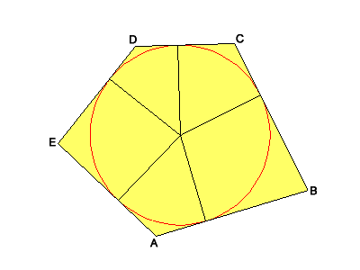 Fünfeck mit Inkreis